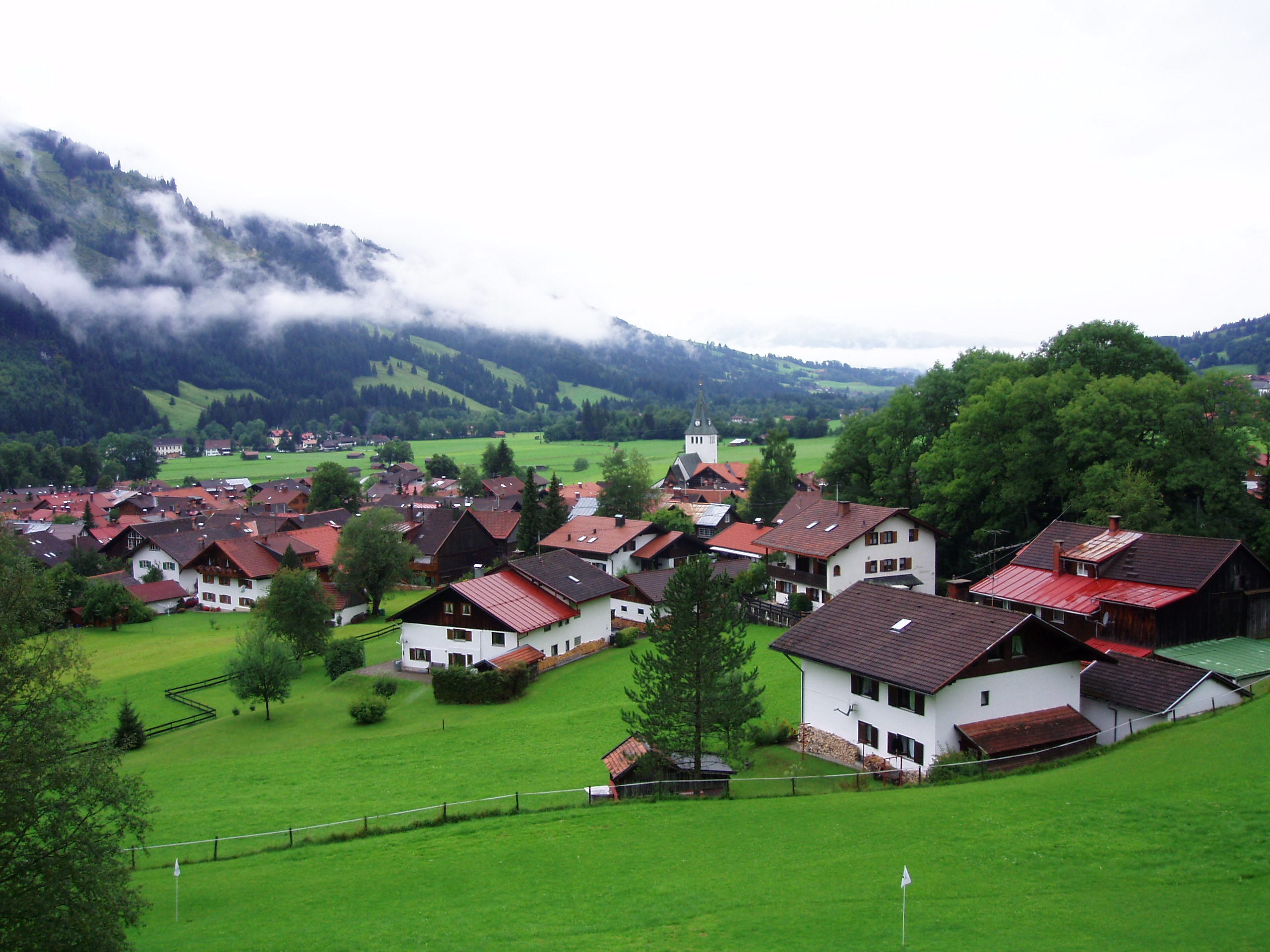 Bad Oberdorf